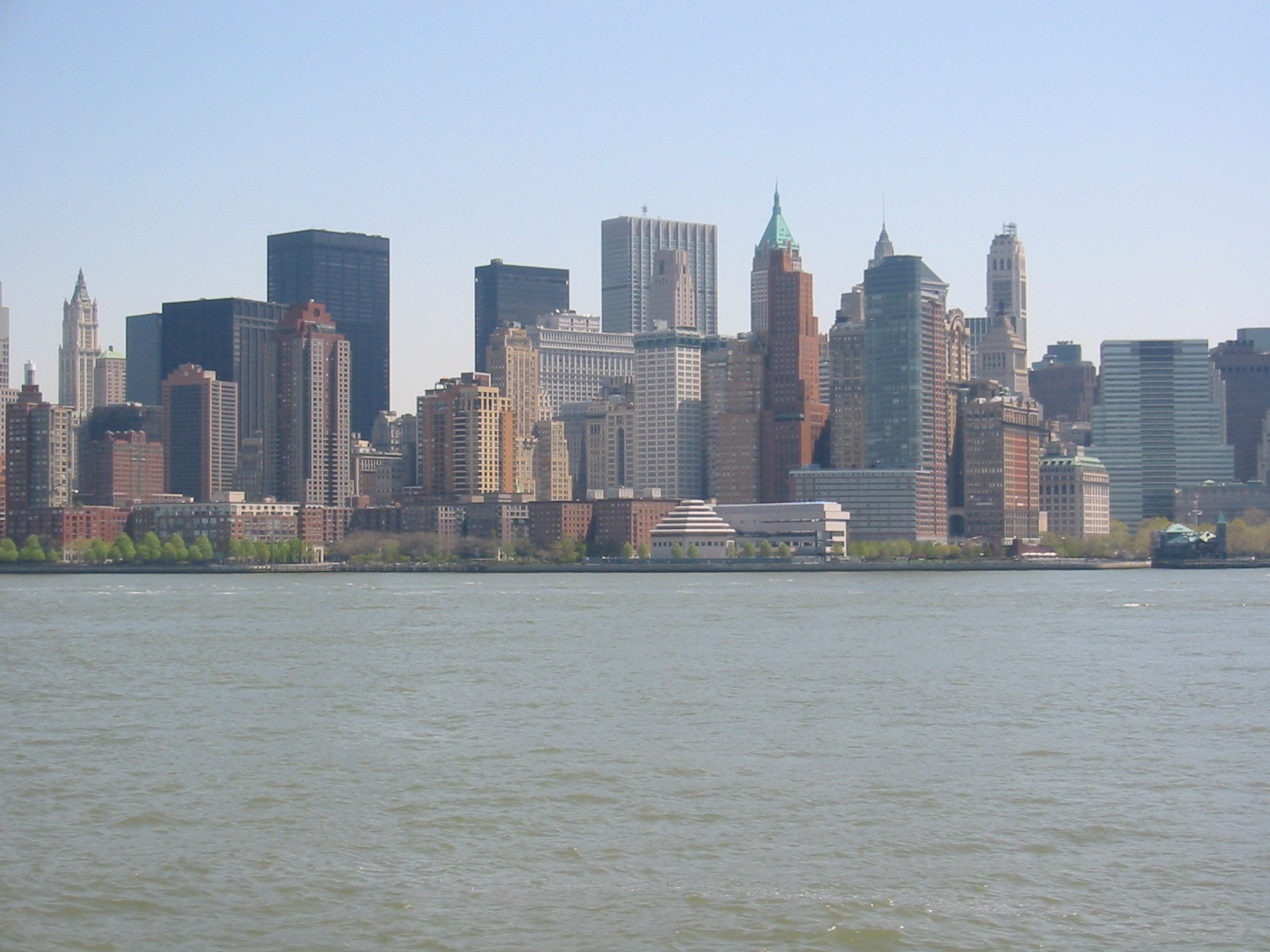 Manhattan